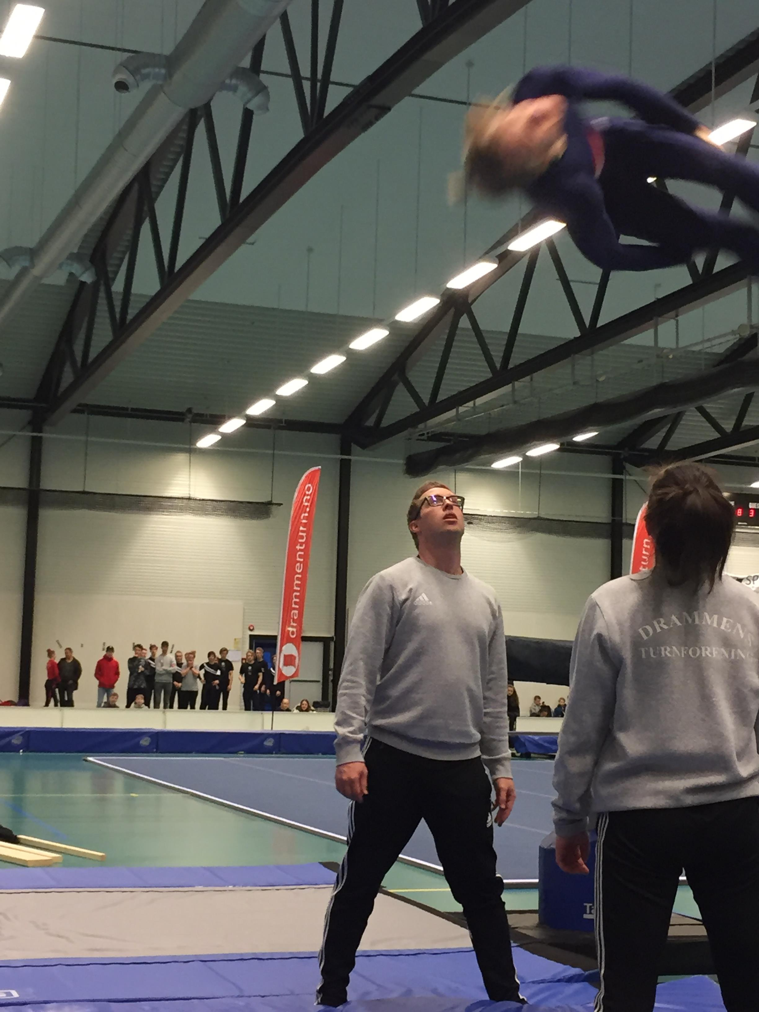 Brian Carlsen (f. 1983) - norsk instruktør i troppsgymnastikk, og tidligere utøver, med EM-gull både som utøver og landslagstrener.